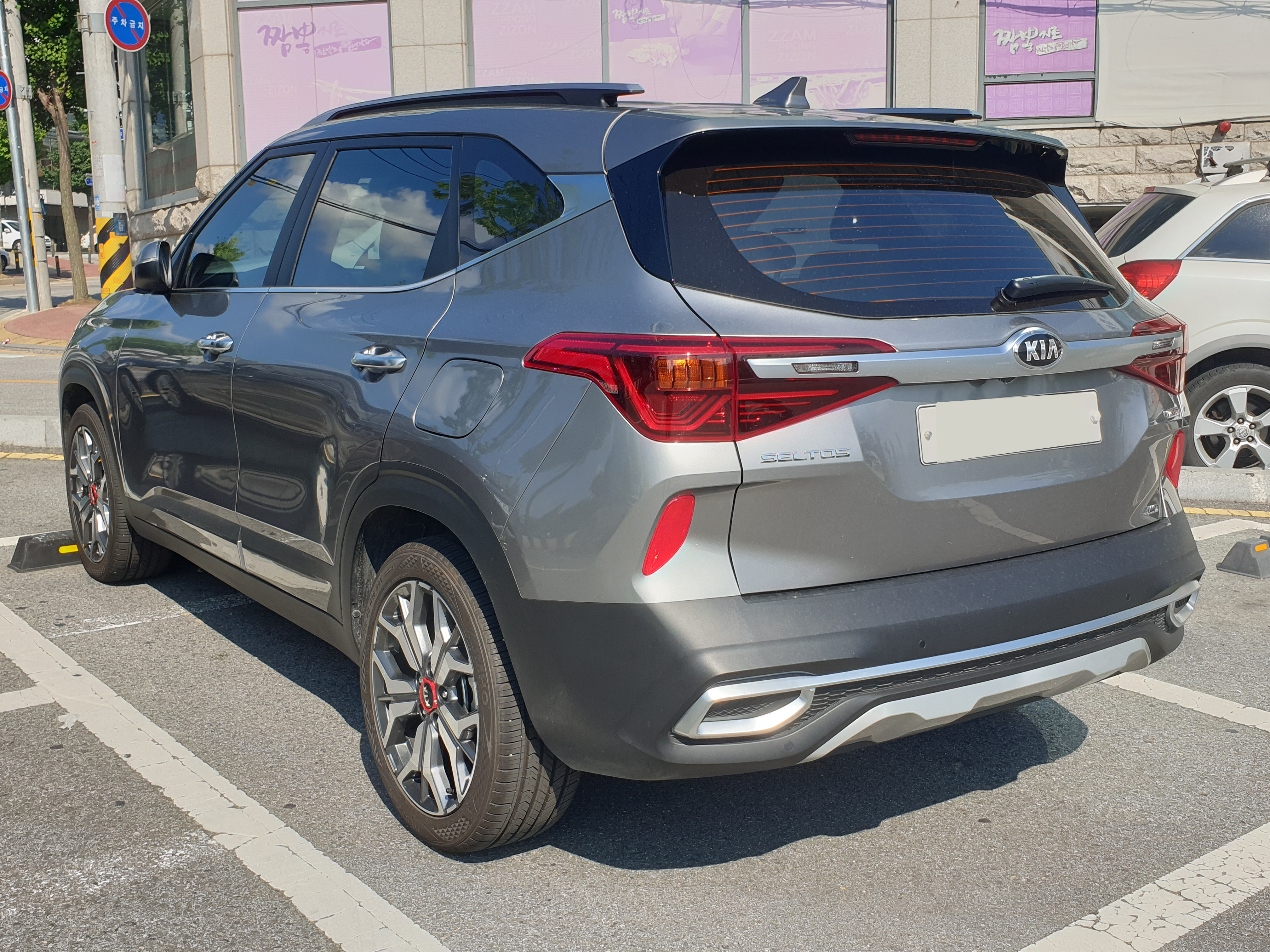 기아 셀토스 후측면